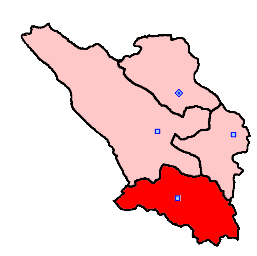 حوزهٔ انتخاباتی لردگان برای انتخابات مجلس شورای اسلامی